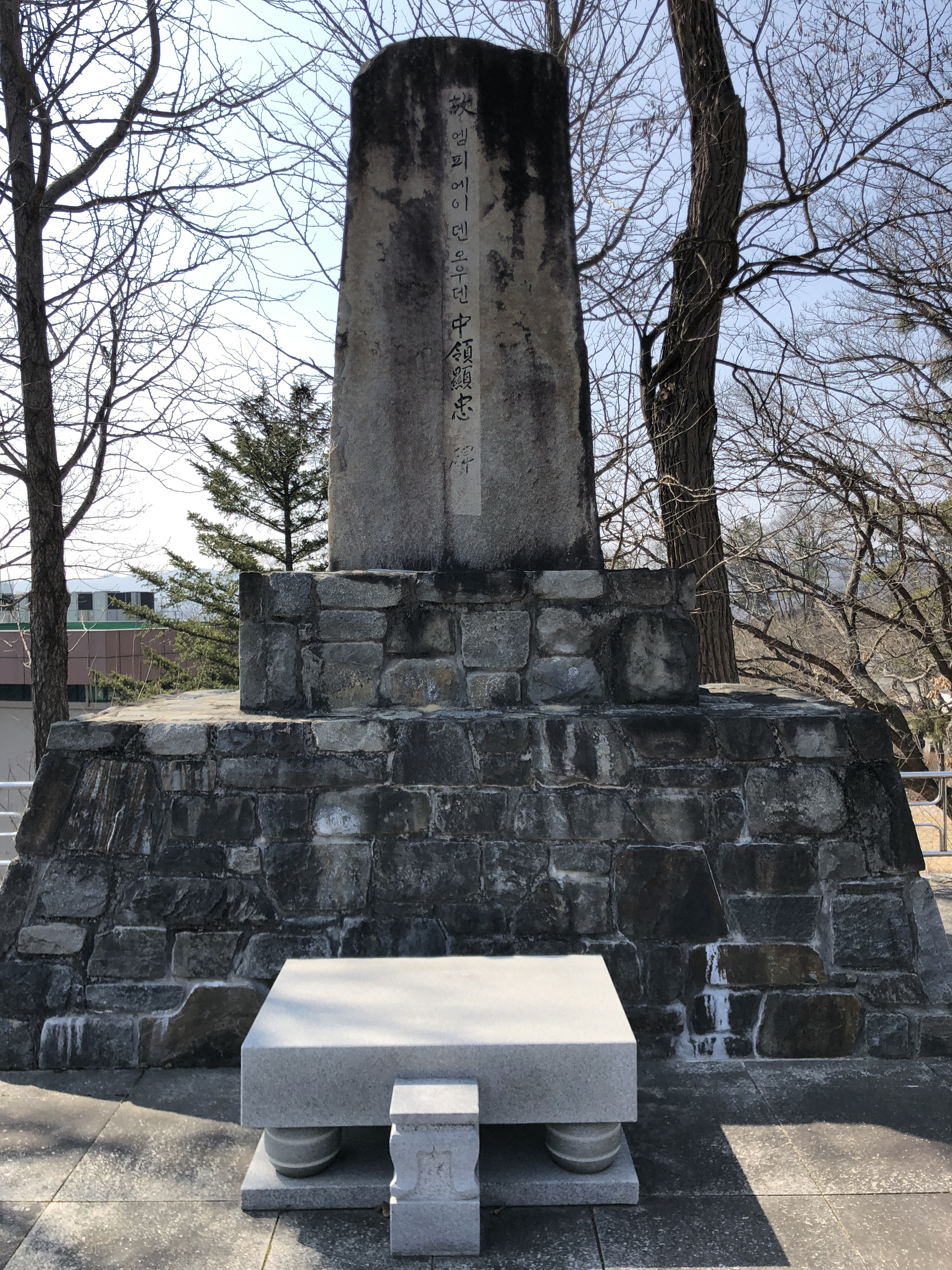 Marinus den Ouden statue